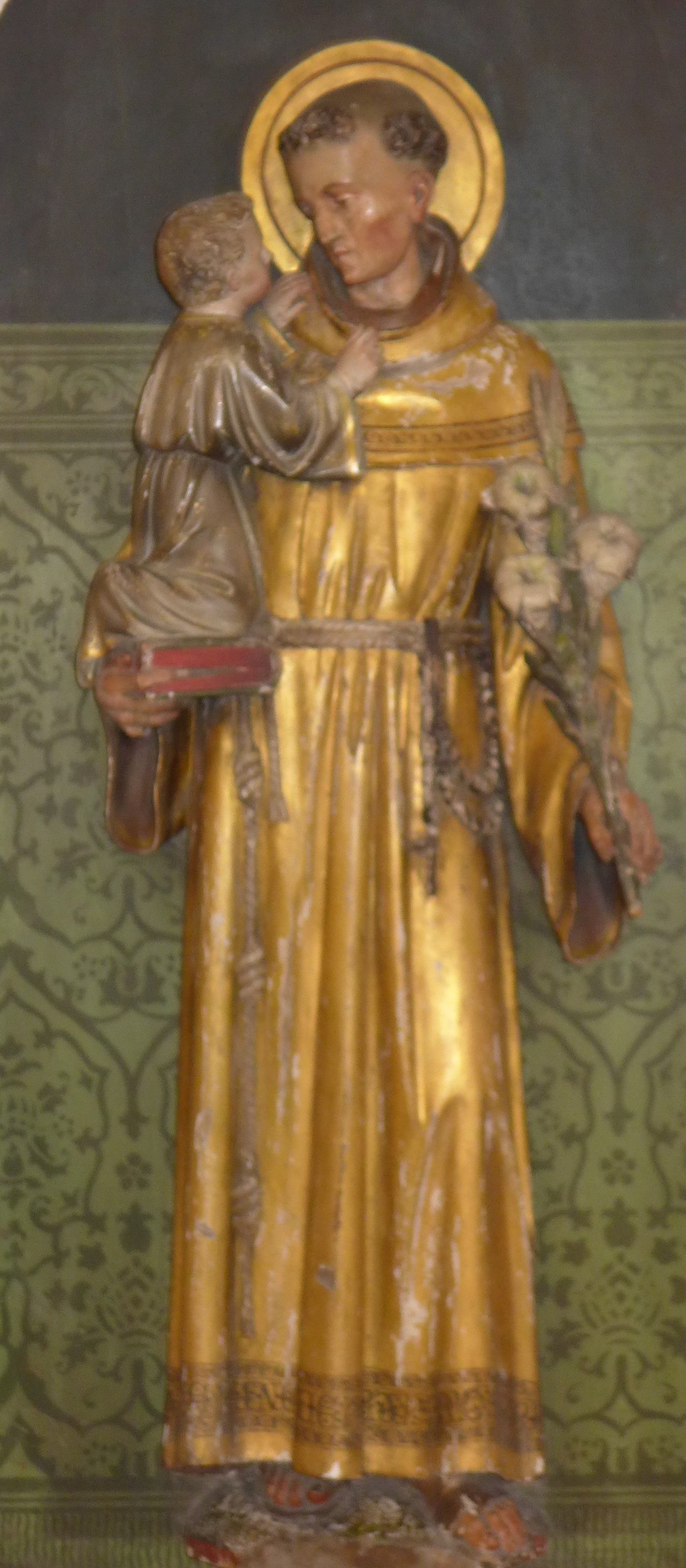 St. Josef (Saarbrücken), St. Antonius von Padua mit dem Jesuskind, Rückseite des des Flügels des Hochaltares